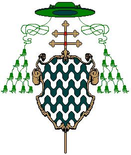 Stemma arcivescovile della famiglia Archinto di Milano